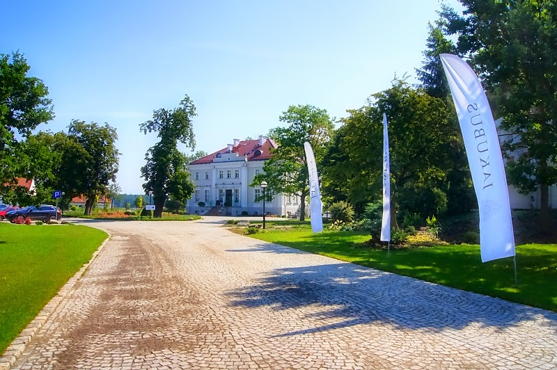 Neoklasycystyczny dwór w Jakubowicach)